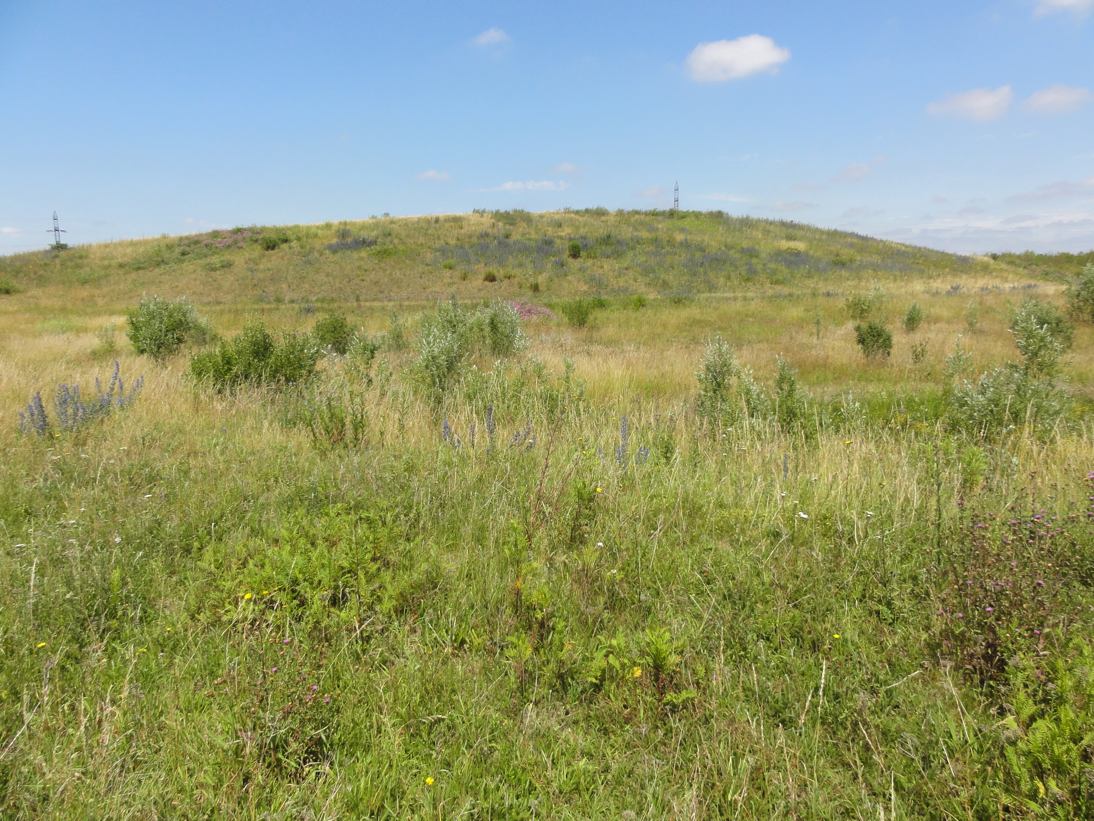 Terril n° 142 dit 8 de l'Escarpelle, fosse n° 8 de la Compagnie des mines de l'Escarpelle dans le bassin minier du Nord-Pas-de-Calais, Auby, Nord, Nord-Pas-de-Calais, France.